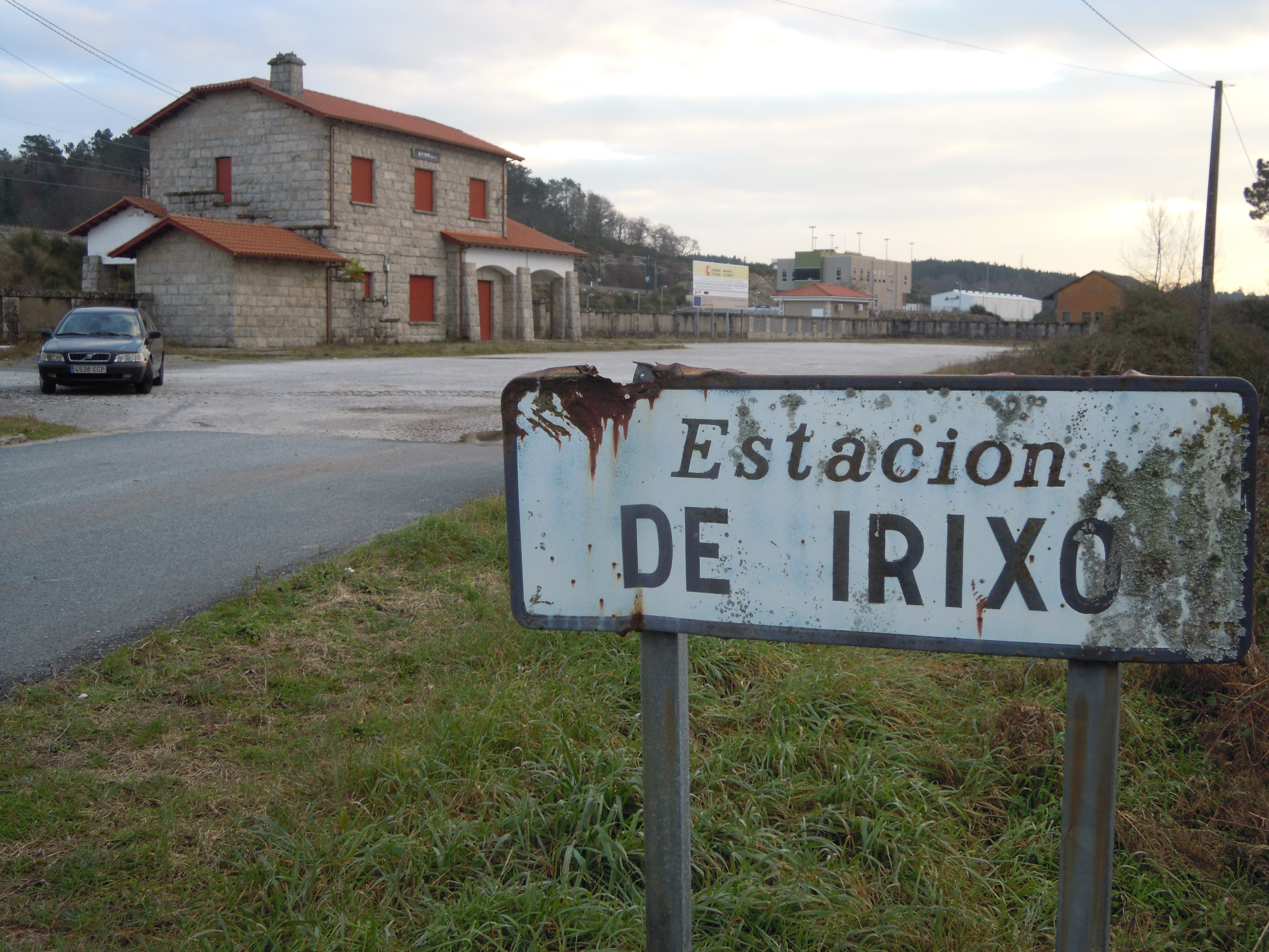 Estación de ferrocarril do Irixo, desde o remate da estrada OU-223